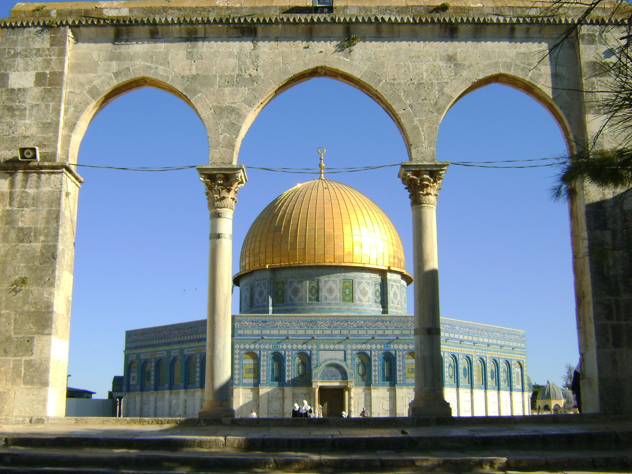 قبة الصخرة المشرفة - القدس الشريف ، فلسطين